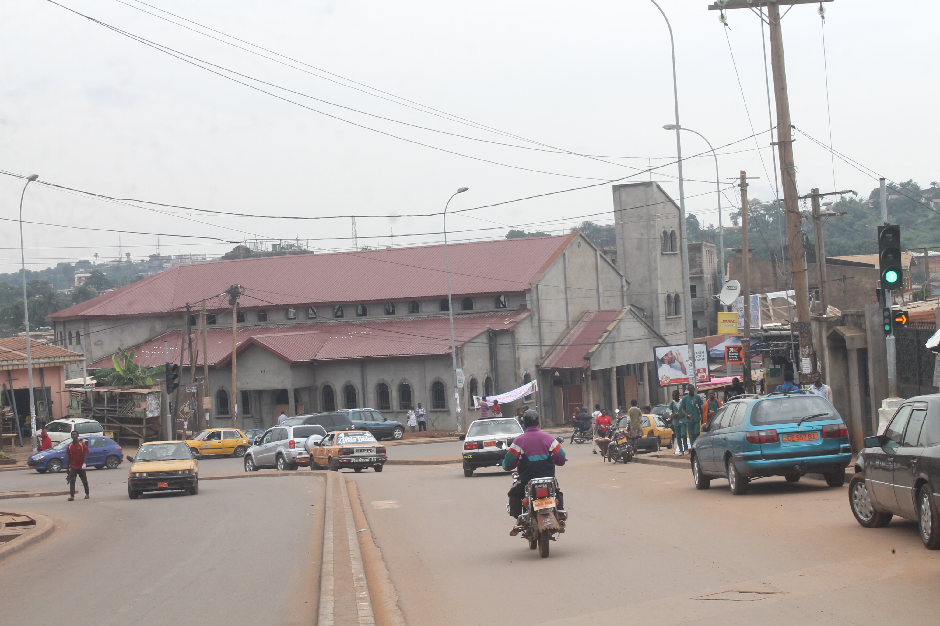 Chapel nsimeyong 1